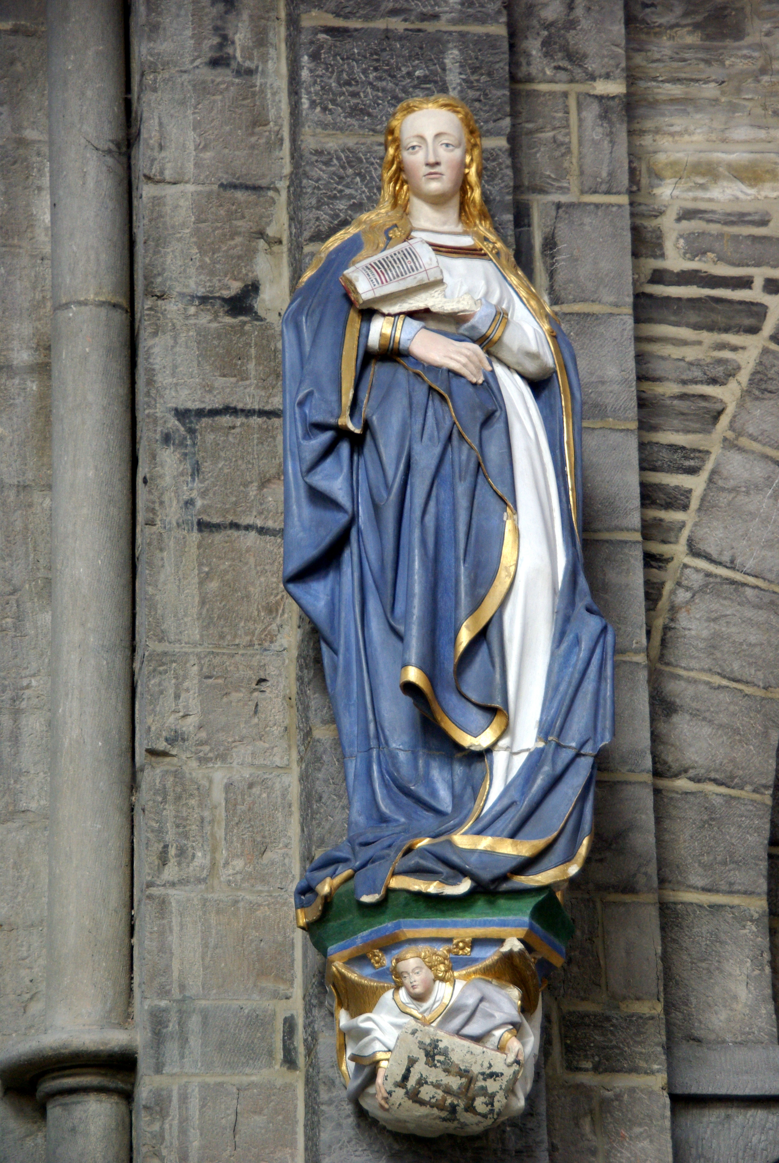 statue composant le groupe dit de l'Annonciation, église Saint-Quentin de Tournai